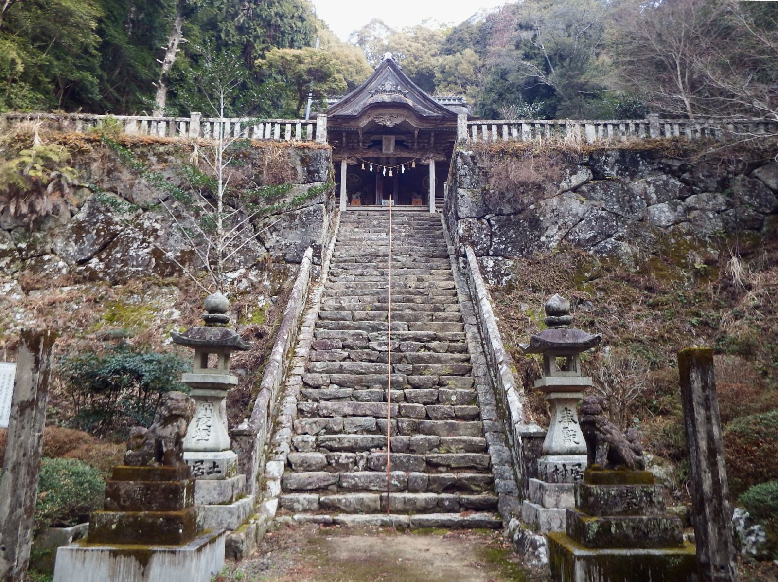 神峯神社 本殿前石段